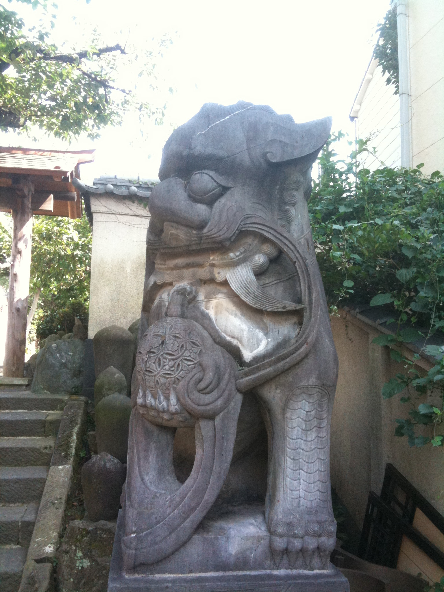 安養院（臥龍山能仁寺）の山門前の狛犬。目黒区下目黒三丁目12。この山門の約25m南に区境があり、本堂の所在地は品川区西五反田四丁目となる。 Ik heb de GPS-coördinaten gecorrigeerd. De foutenmarge moet tussen ±5 meter liggen.--トトト (talk) 20:54, 18 October 2018 (UTC)